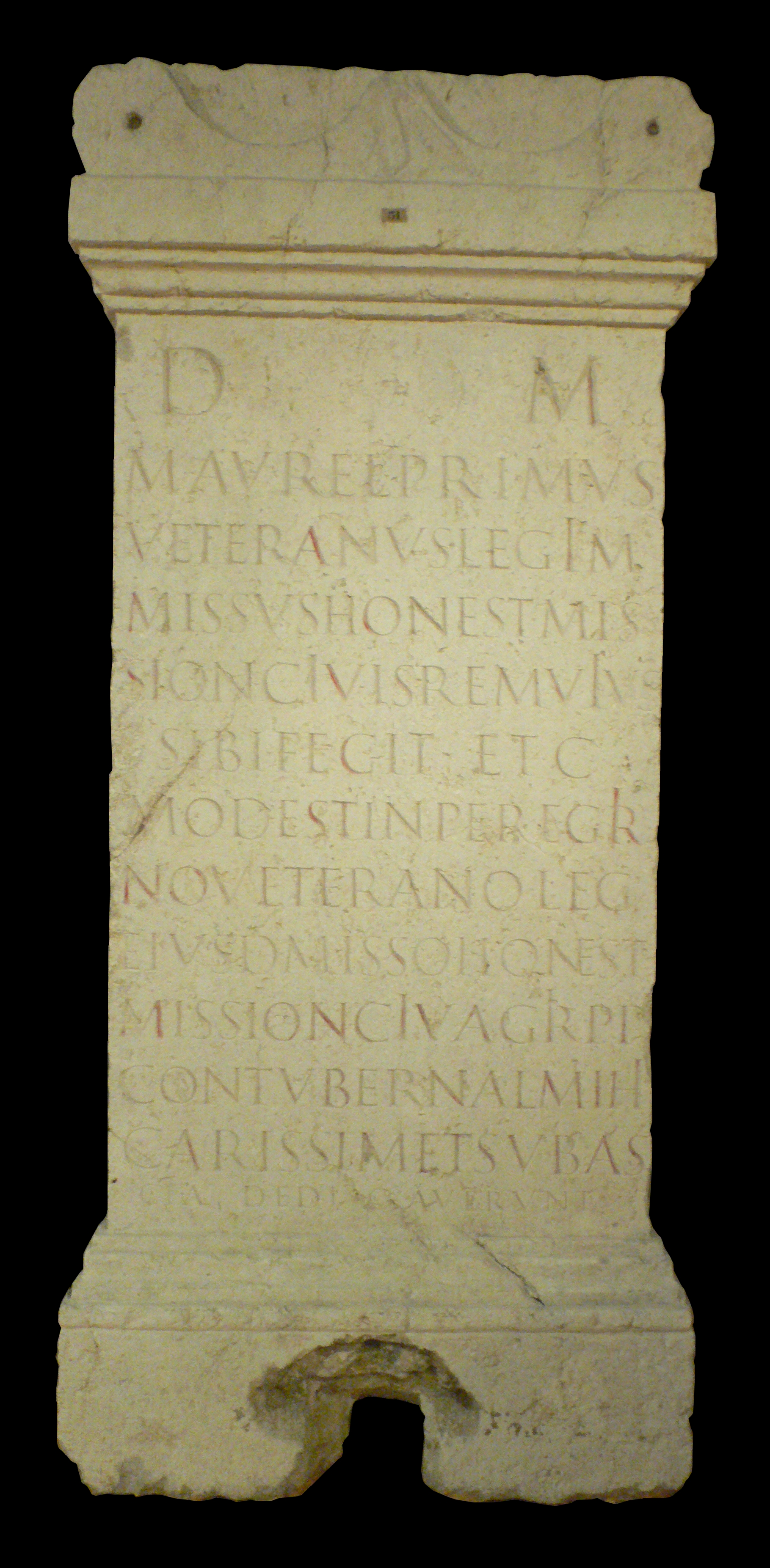 Musée gallo-romain de Fourvière (Lyon) - Cippe avec base et couronnement découvert en 1846 dans l'ancienne église de Vaise à Lyon. D(iis) M(anibus) / M. Aurel(ius) Primus / veteranus leg(ionis) I M(inervae); / missus honest(a) mis/sion(e); civis Rem(us), viv(u)s / sibi fecit et C. / Modestin(io) Peregri/no, veterano le(ionis) eiusd(em) misso honest(a) / mission(e) civ(i) Agripp(inensi) / contuberal(i) mihi / carissim(o) et sub as/cia dedicaverunt. : Aux dieux Mânes, Marcus Aurelius Primus, vétéran de la légion Ière Minervia, libéré avec le congé honorable, citoyen rème, a, de son vivant, préparé ce tombeau pour lui-même et pour Caius Modestinius Peregrinus, vétéran de la même légion, libéré avec le congé honorable, citoyen agrippinien (de Cologne en Allemagne), son compagnon de tente très cher, et ils l'ont dédié sous l'asica.